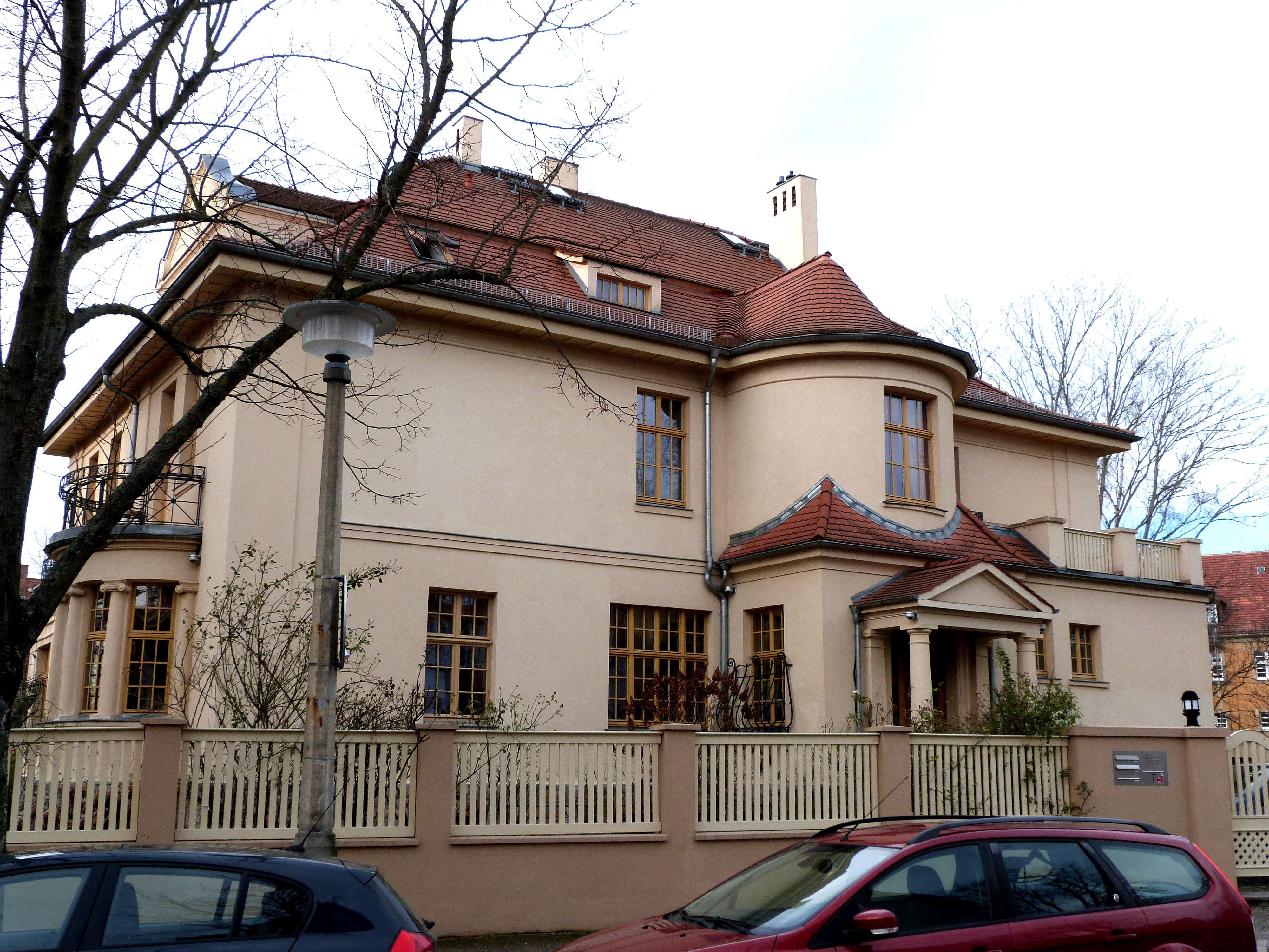 Rathenauplatz 7, Halle (Saale)